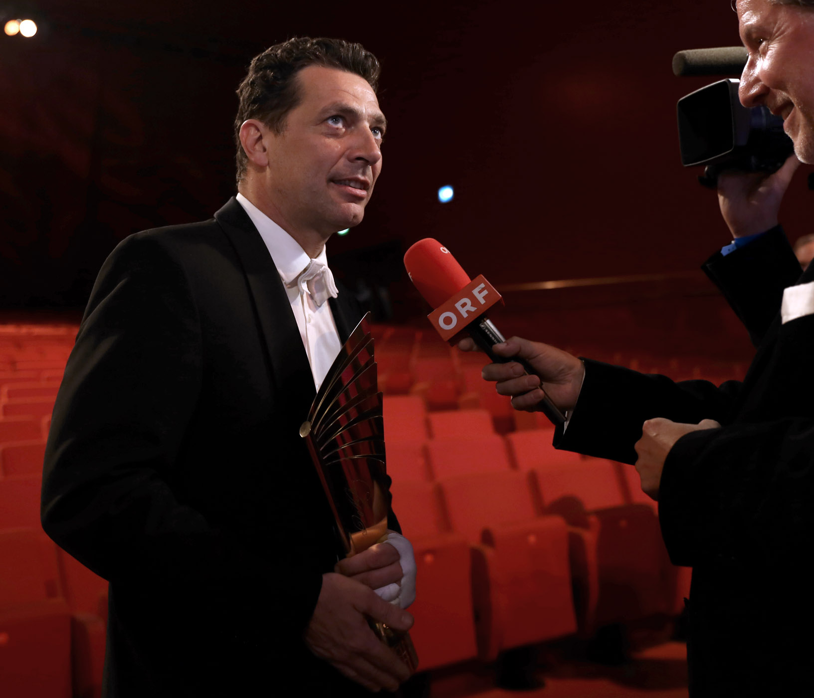 Gregor Bloéb - Nestroy-Theaterpreis 2013 in der Halle F der Wiener Stadthalle (Wien, Österreich).